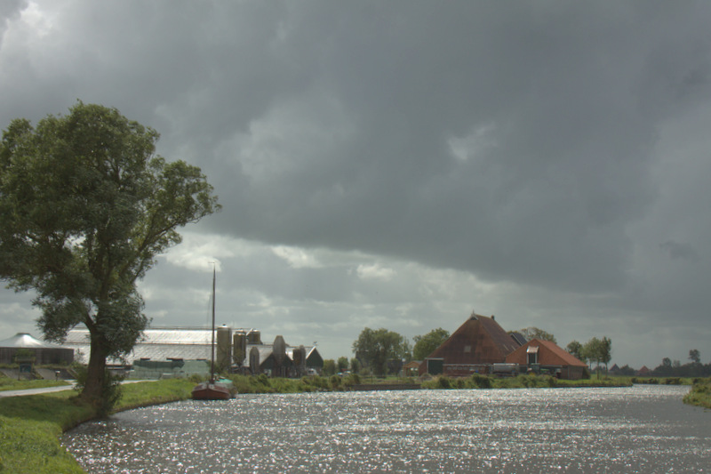 Ruig weer bij Domwier aan de Eagumerdjip.